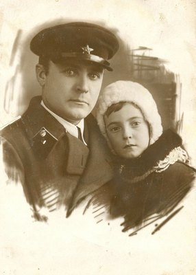 Шуров, Пётр Евдокимович с дочерью Нинель. 1936 г.